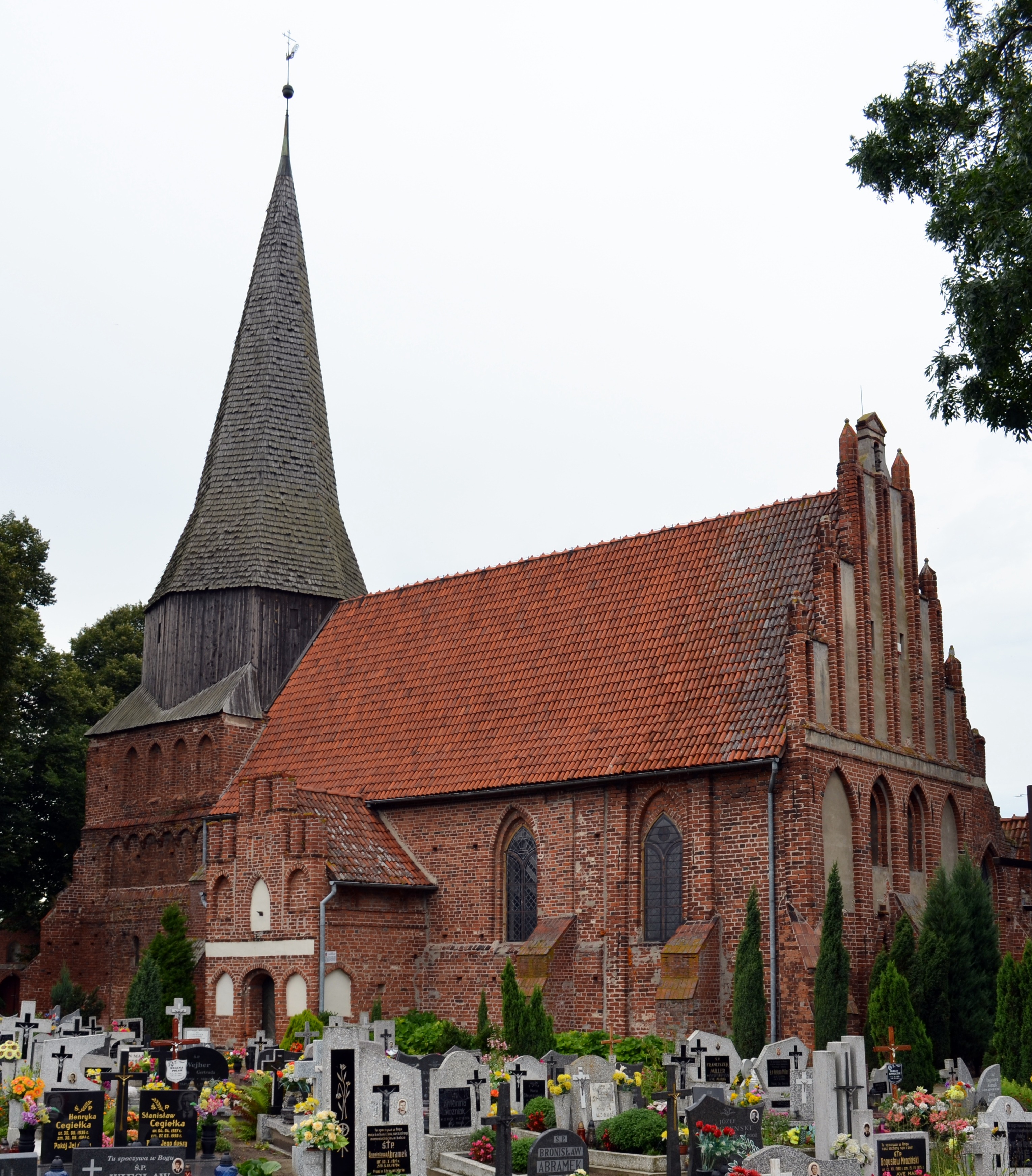 Mątowy Wielkie (vor 1945 Groß Montau): Kirche